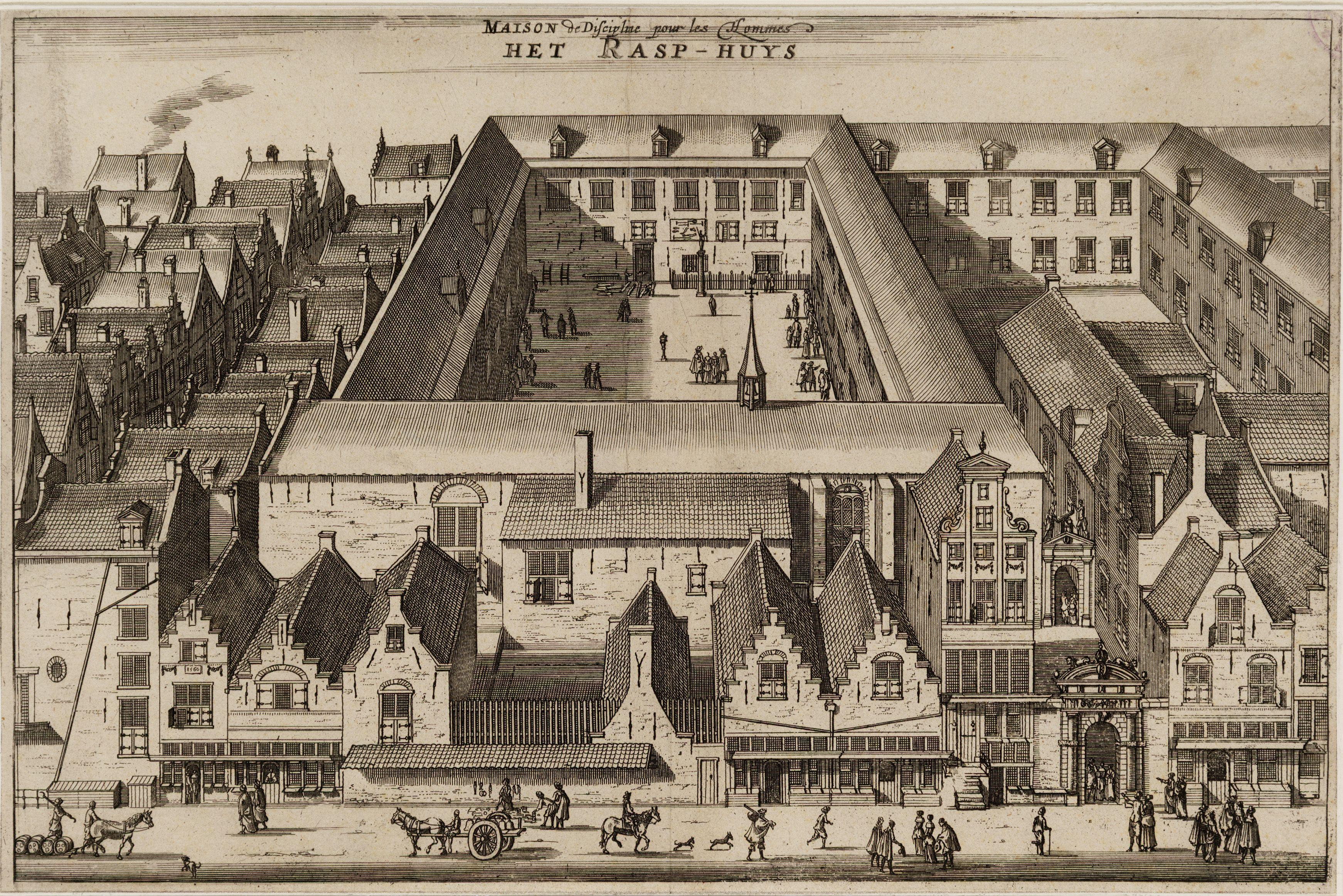 Het Rasp-Huys. Ets. Amsterdam, Stadsarchief Amsterdam, collectie tekeningen en prenten.